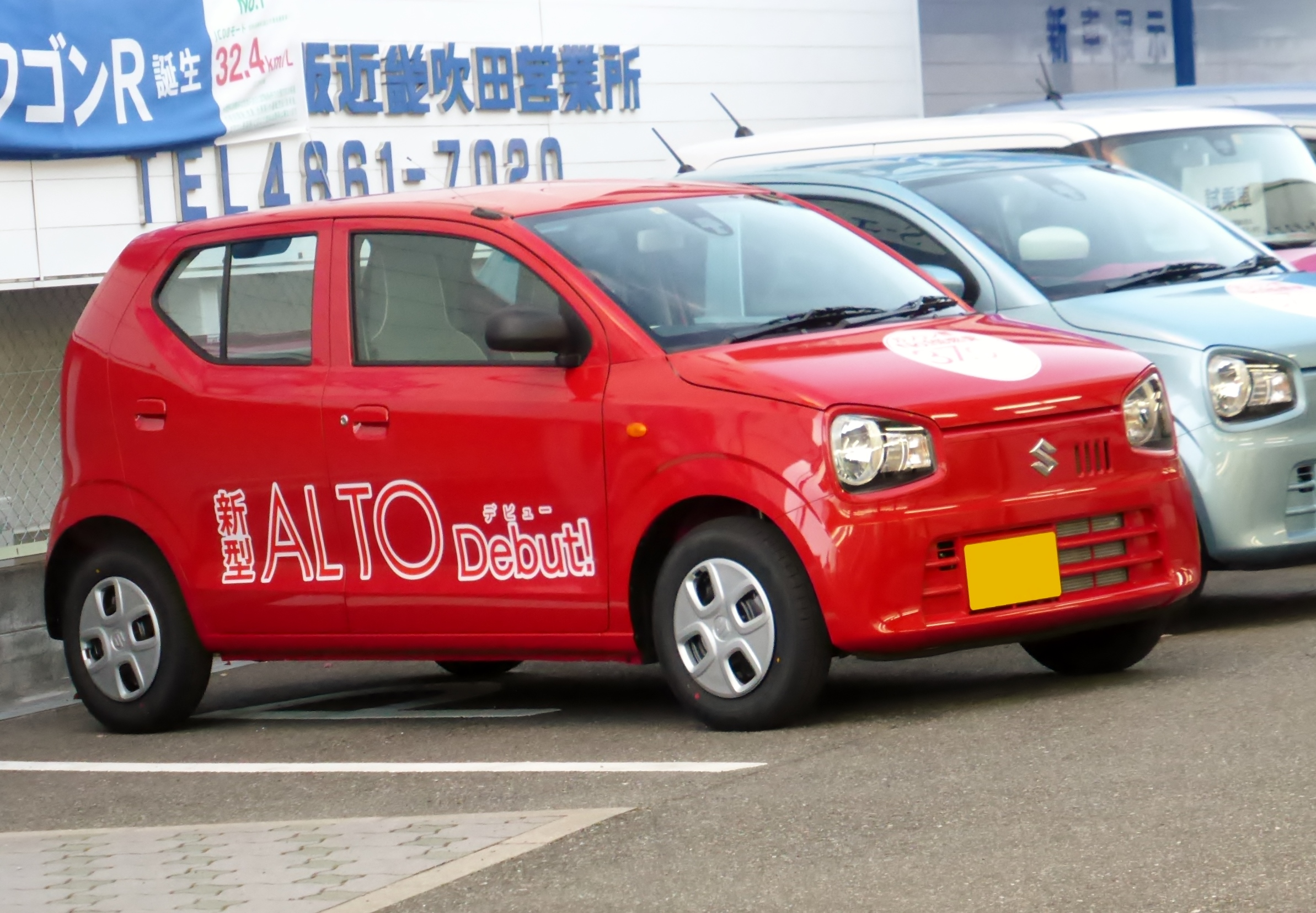 HA36S型スズキ・アルトSを右から撮影。